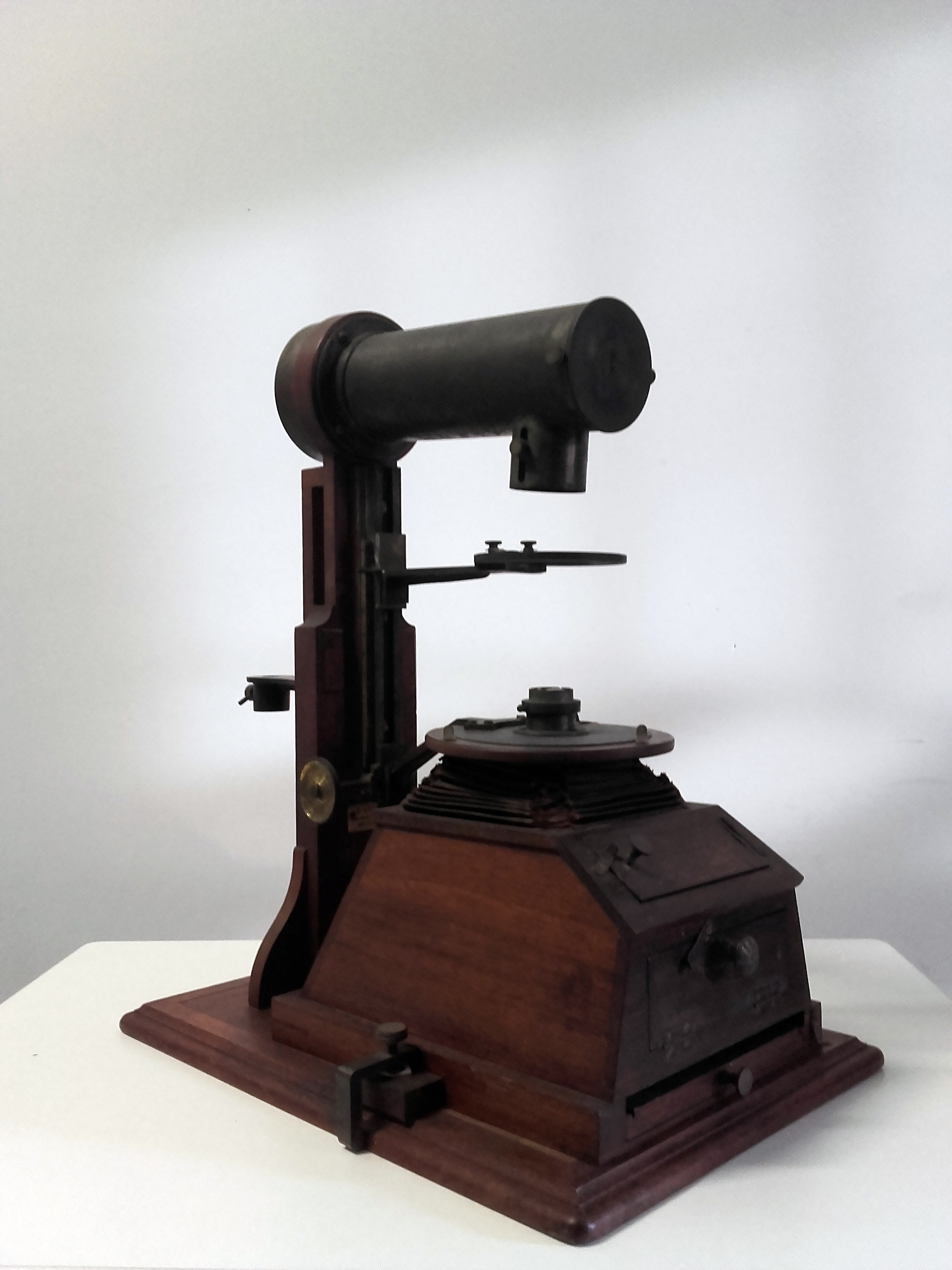 Il permet des microphotographies sur plaques 13 x 18 cm. Le bâti de l’appareil est en noyer ciré, le soufflet en peau. Le dispositif de réglage de netteté est réalisé par une crémaillère en laiton. La source de lumière est manquante. Fabriqué par la Maison Ernest Leitz